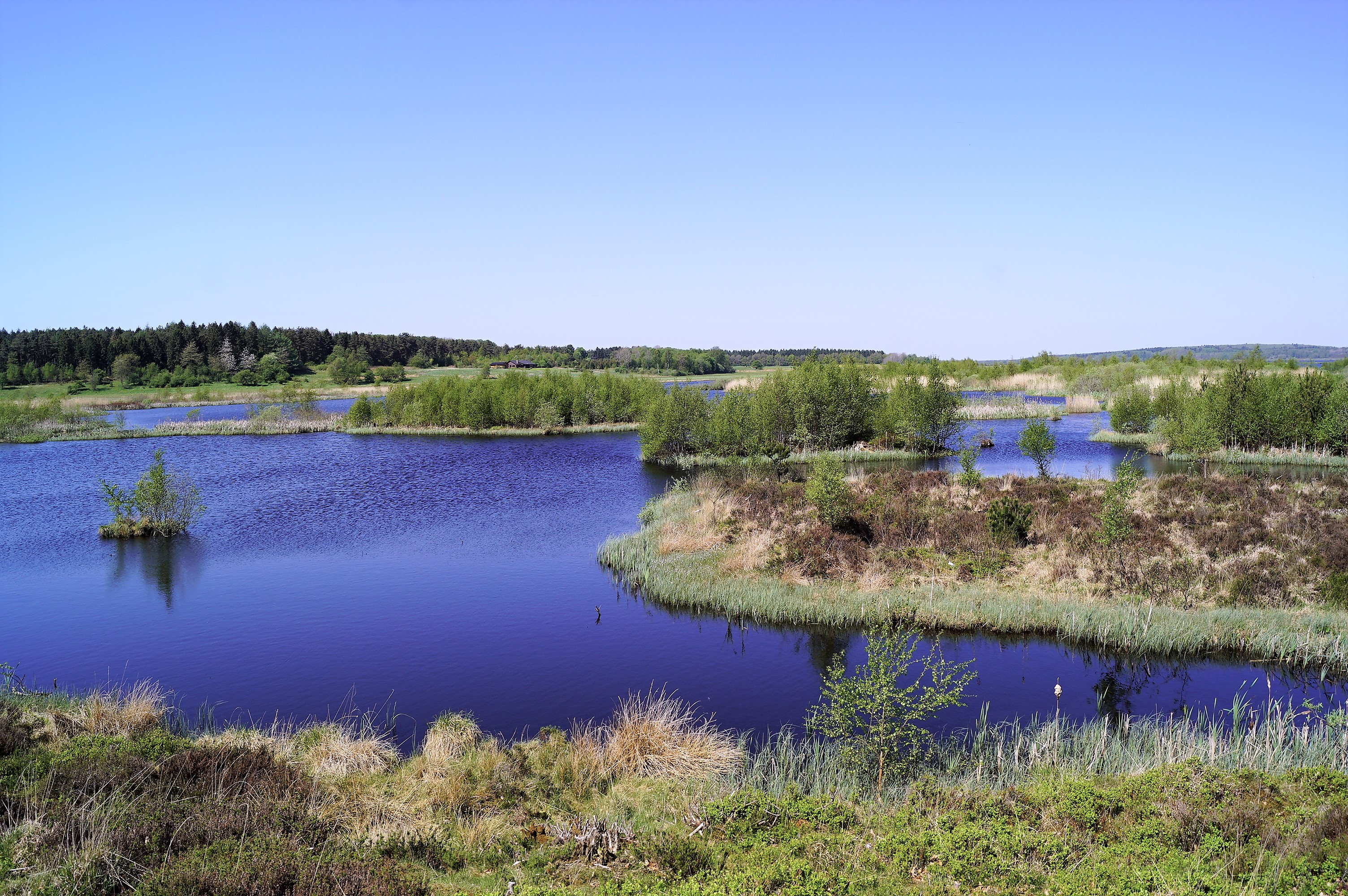 Bøllingsø sydøstenden set mod sydvest